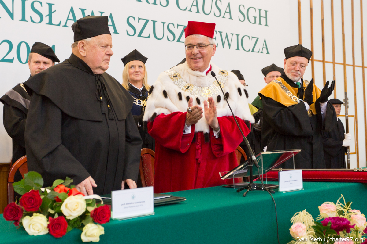 Uroczystość nadania tytułu doktora honoris causa Szkoły Głównej Handlowej w Warszawie Stanisłauowi Szuszkiewiczowi.